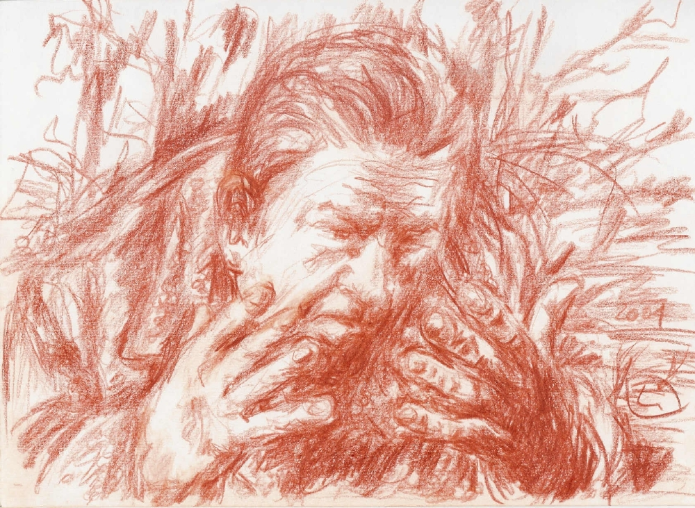 Aktor Mariusz Dmochowski w roli Wokulskiego, pastel na podstawie fotosu kinowego, format A-4.